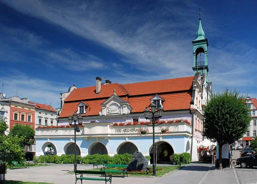 Ratusz w Kluczborku